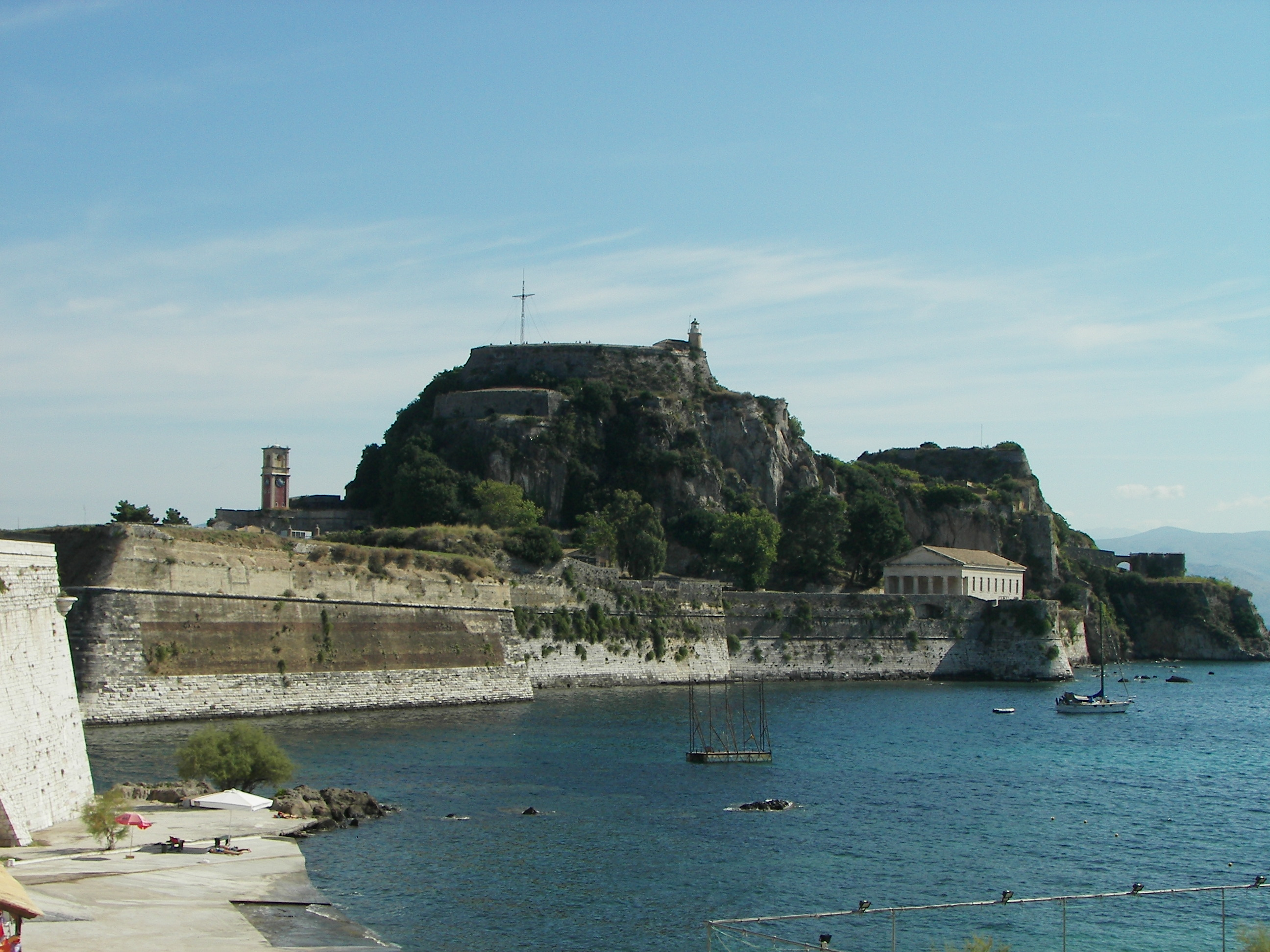 Alten Festung (Palaió Froúrio) in Korfu